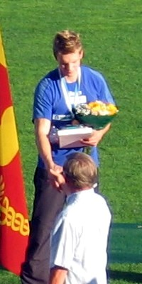 Joni Rautanen Kalevan kisoissa, Ratinan stadionilla, Tampereella, 26. heinäkuuta 2008